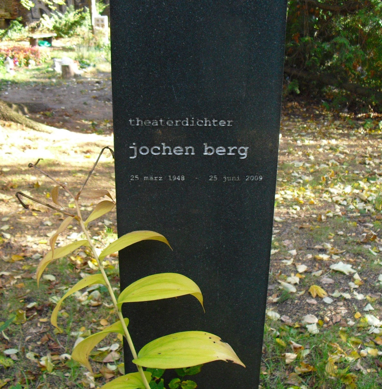 Grabstein für Schriftsteller Jochen Berg auf dem Neuen Friedhof St. Marien-St. Nikolai in Berlin-Prenzlauer Berg